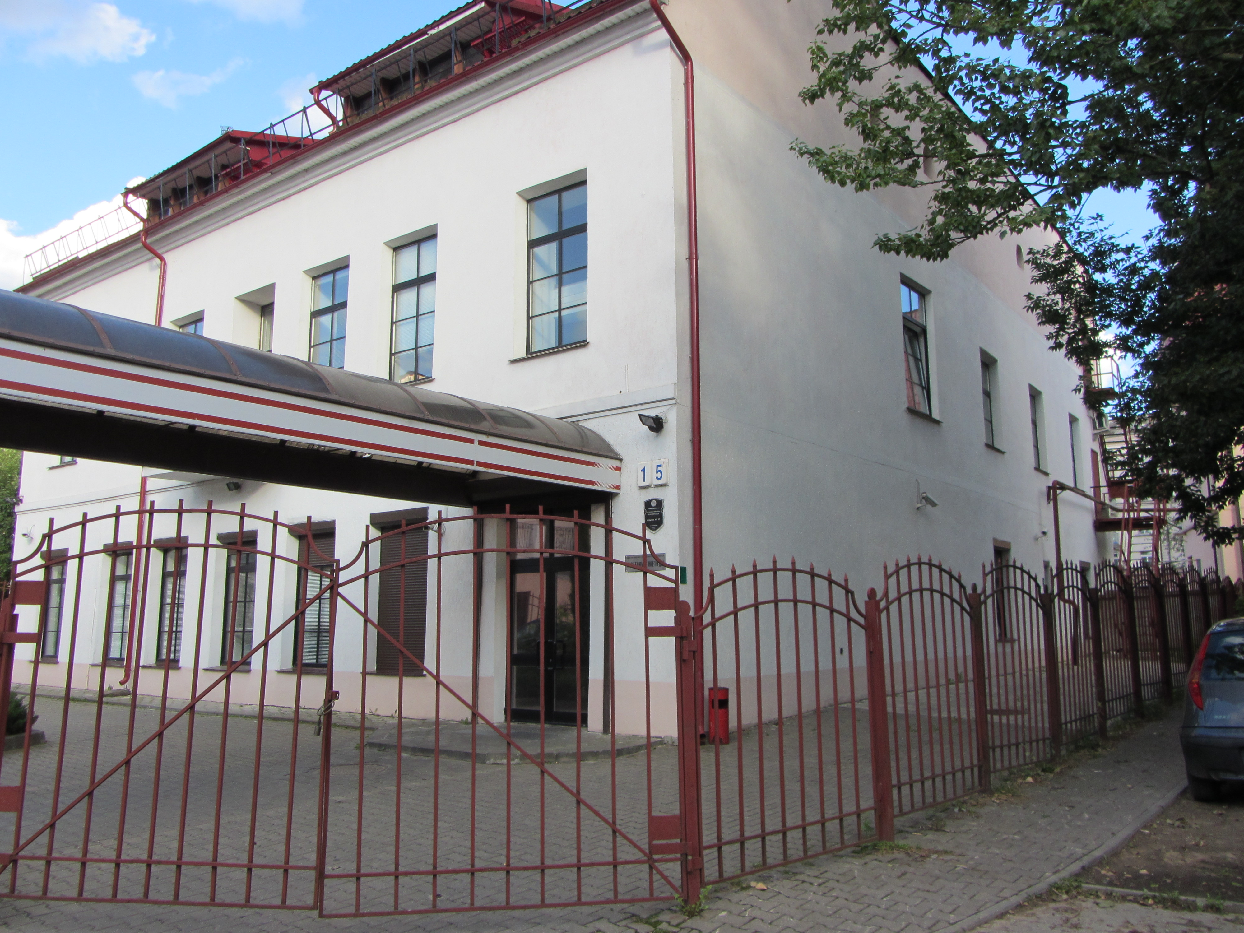 Беларуская (тарашкевіца): Вуліца Рэвалюцыйная, 15а